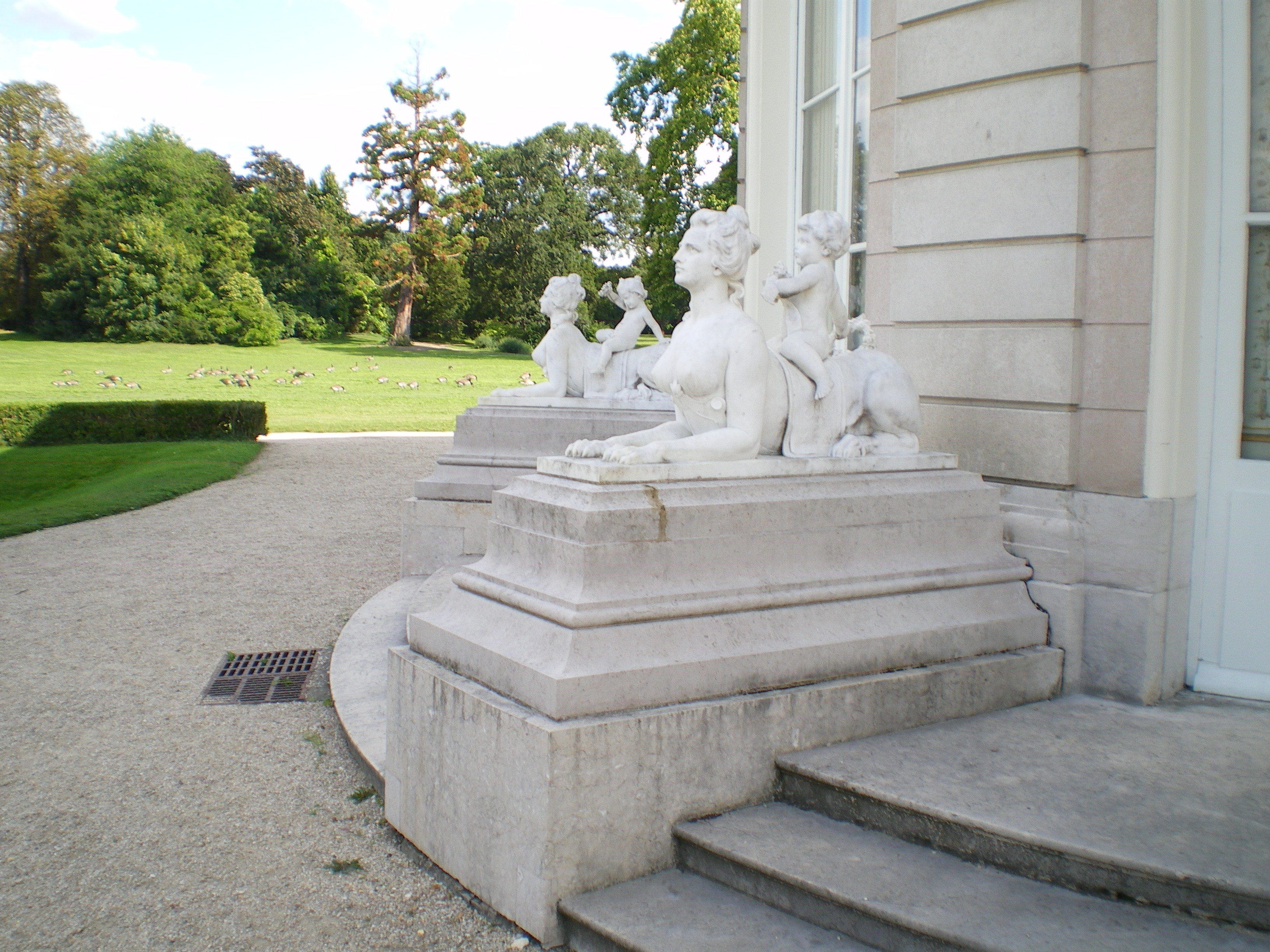 Les sphinges du château de Bagatelle (Paris)